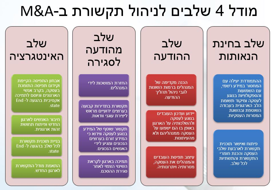 שלבים בתקשור מיזוגים ורכישות